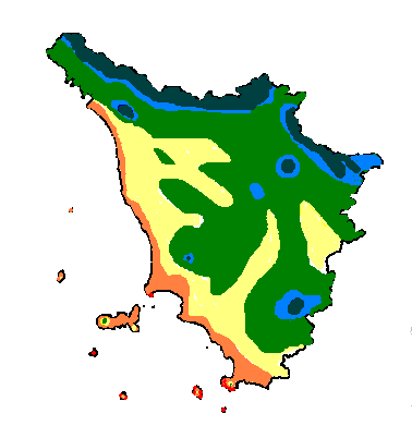 Carta della temperatura media di gennaio in Toscana (1961-1990) 10 °C